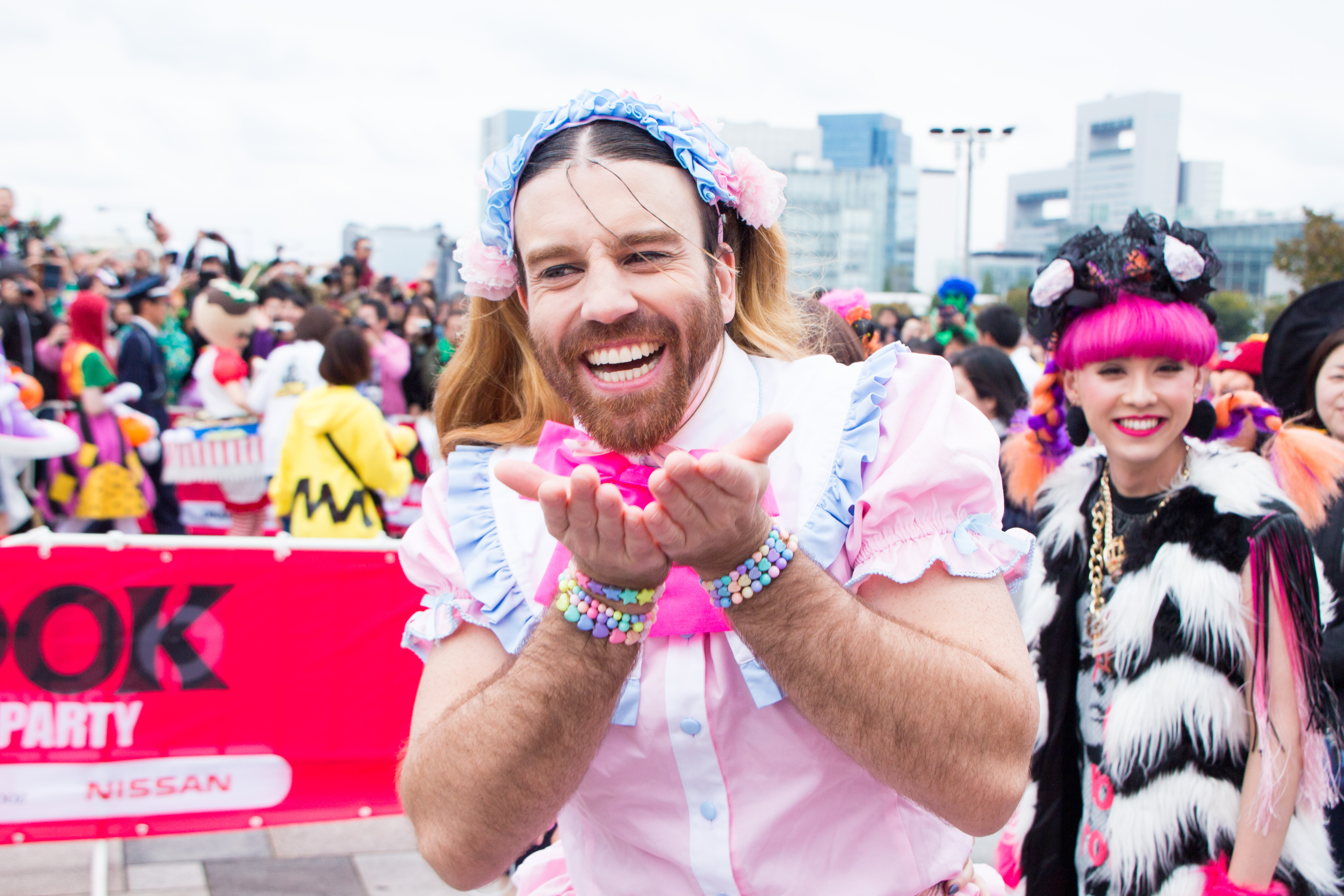 T-SPOOK 2016 Ladybeard (わんちゃんズ)